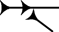 Cuneiform sign